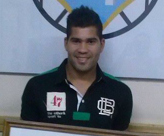 Cristian Taborda, luego de firmar su contrato en Liga Mendocina de Fútbo para jugar en Gimnasia y Esgrima de Mendoza.